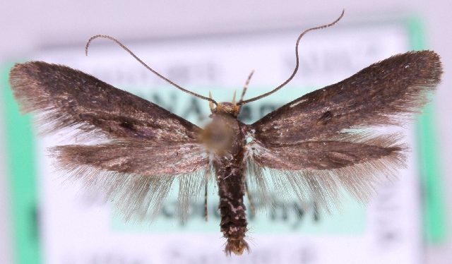 Spuleria flavicaput